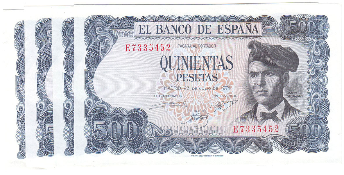 500 Pesetas. 23 Julio 1971. Serie E. Lote de 4 billetes correlativos. ED.D74A. Arruga y ligeras muescas en margen. SC